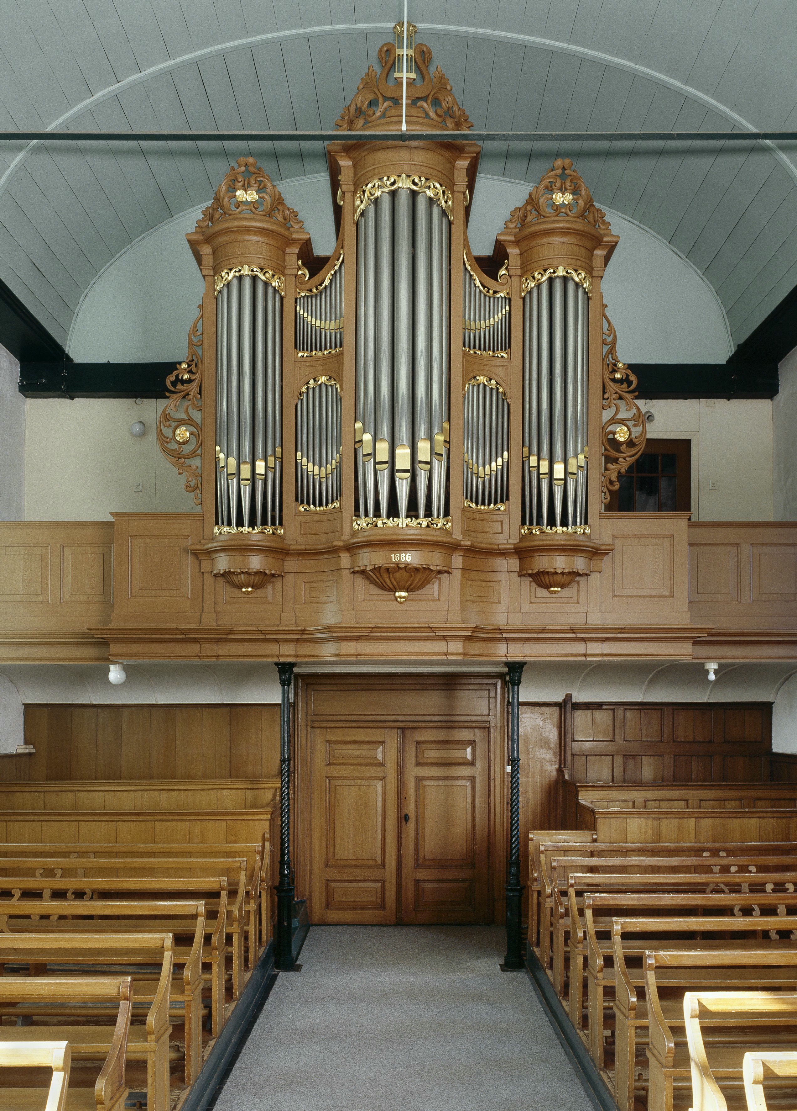 Nederlands Hervormde Kerk: Interieur, aanzicht orgel, orgelnummer 474 (opmerking: Gefotografeerd voor Het Historische Orgel in Nederland 1886-1894, bladzijde 25)